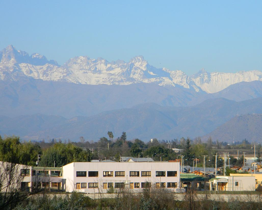 Imagen tomada desde el cerro Tren Tren